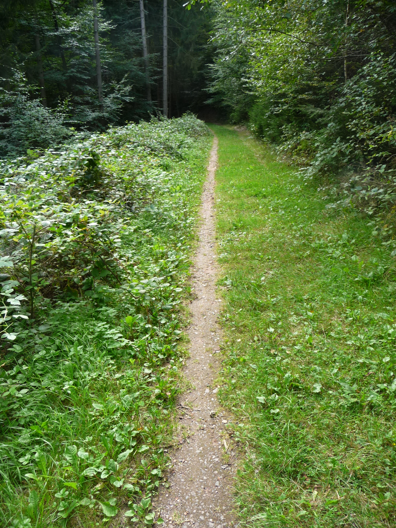 Freunde, einen Waldweg, einfach als Radweg zu bezeichnen, das ist doch ein bisschen einfach.